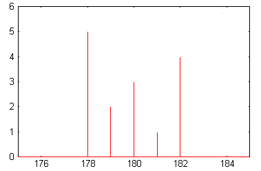 Exemple de diagramme en bâtons. Image personnelle crée avec gnuplot et gimp2.